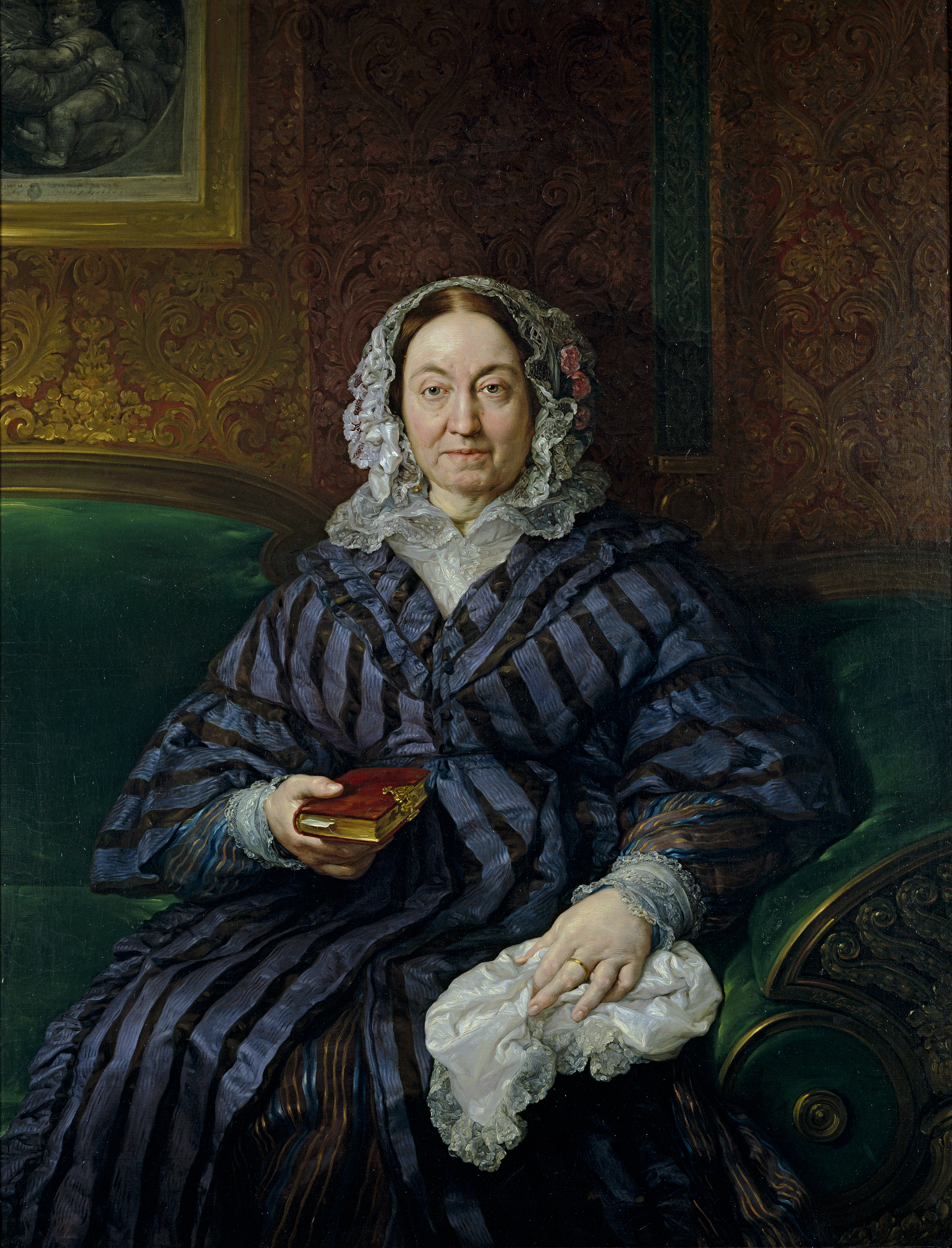 Retrato de Francisca de la Gándara y Cardona (1786-1855), que fue la esposa del general Félix Calleja, conde de Calderon, ultimo virrey de Nueva España y capitán general de Valencia y Andalucía.